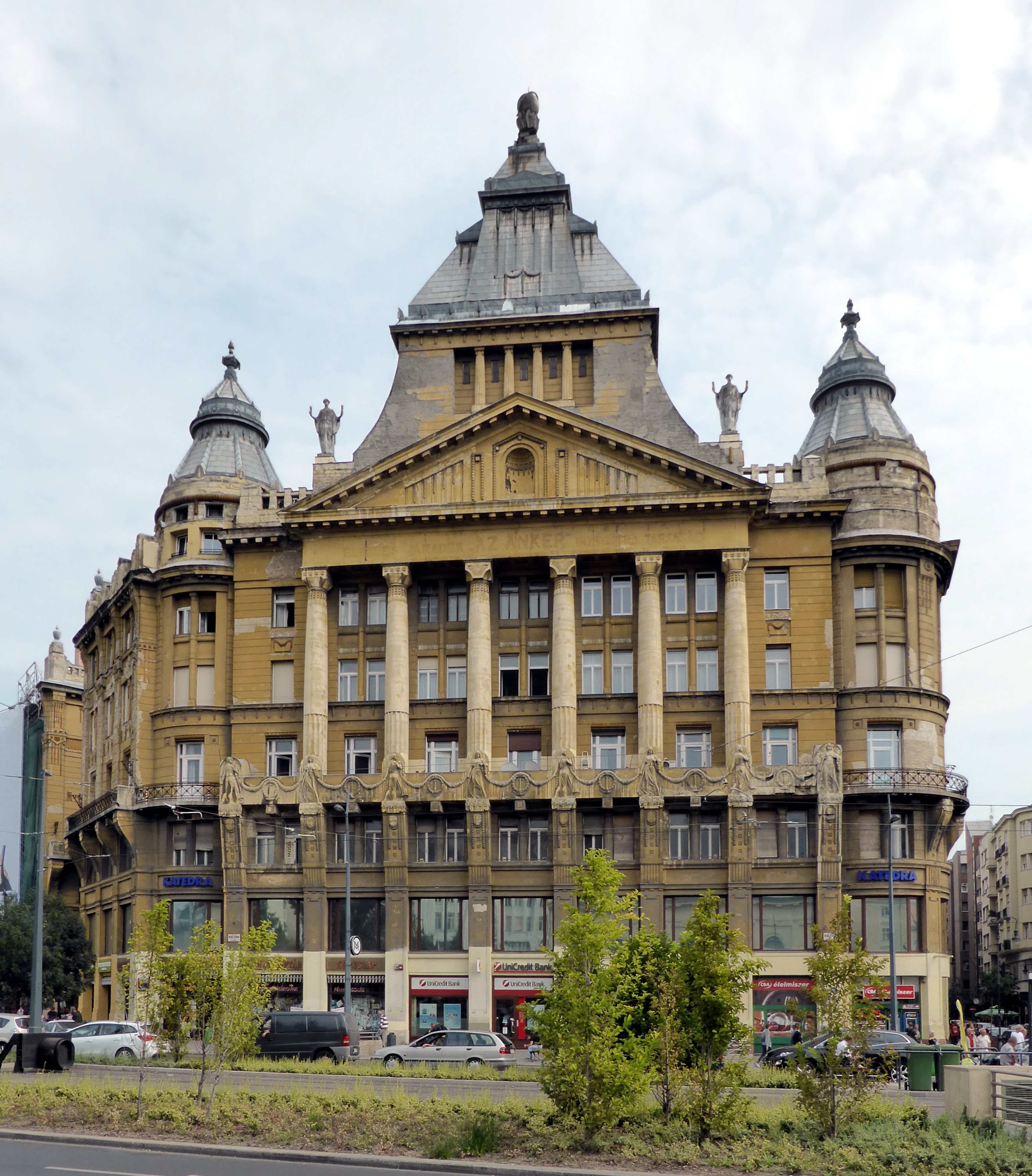 Das Anker-Palais am Deák-Ferenc-Platz in Budapest.